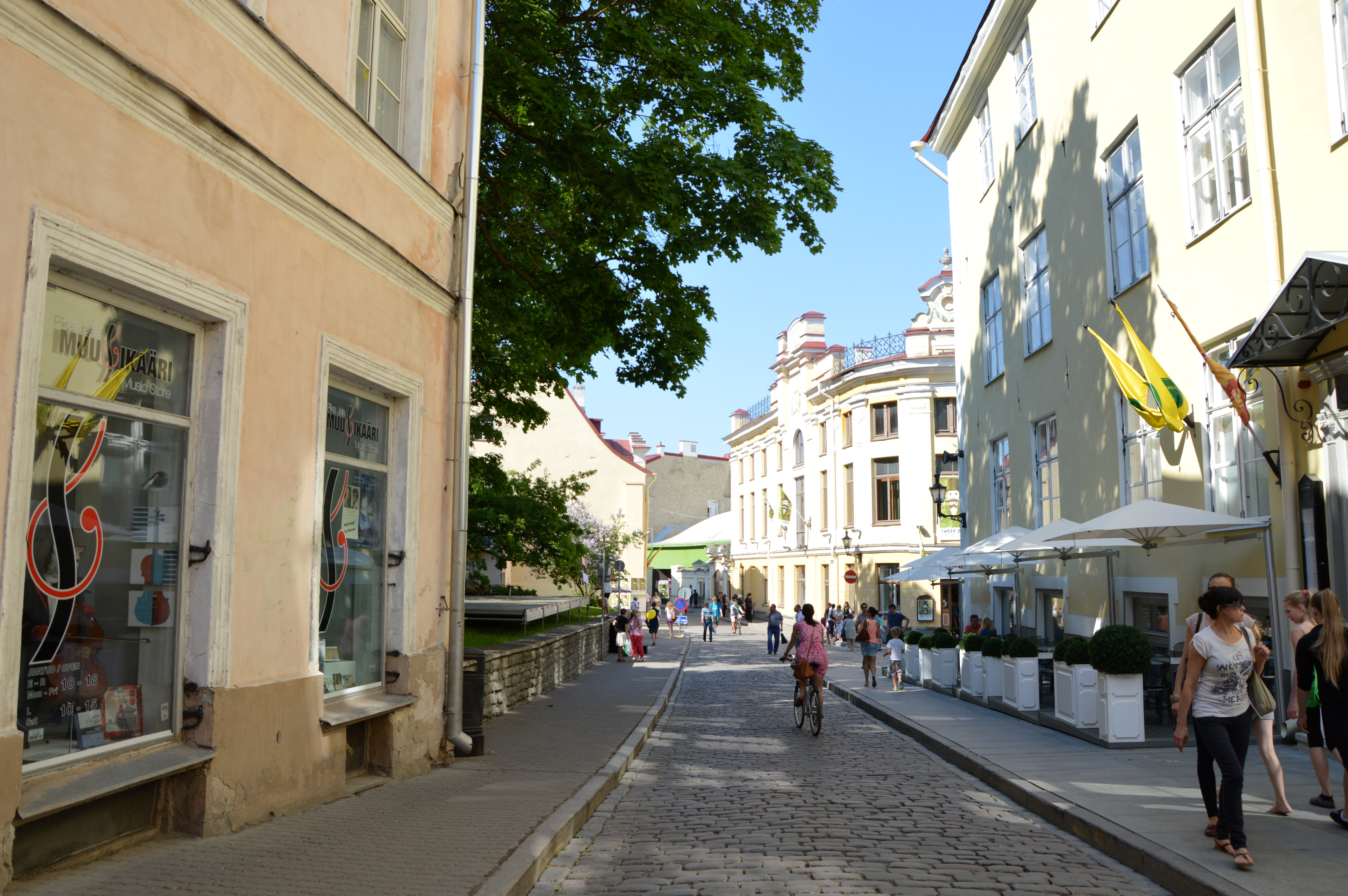 Vaade Pikalt tänavalt Nunne tänavale